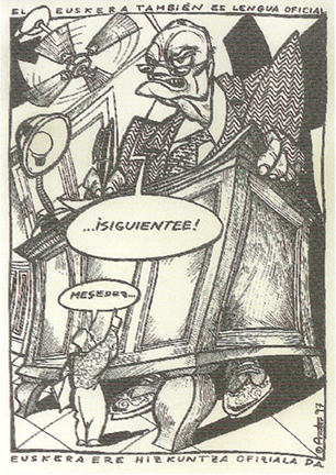 El euskera tambien es lengua oficial